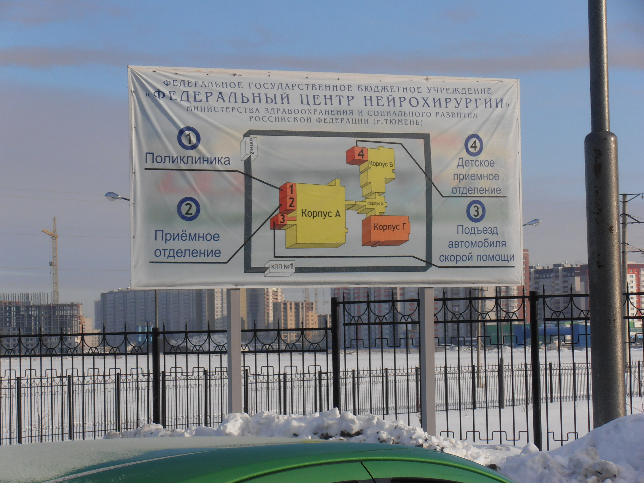 Схема Федерального центра нейрохирургии в Тюмени (пос. Патрушево, Червишевский тракт, 4-й км, дом 5)